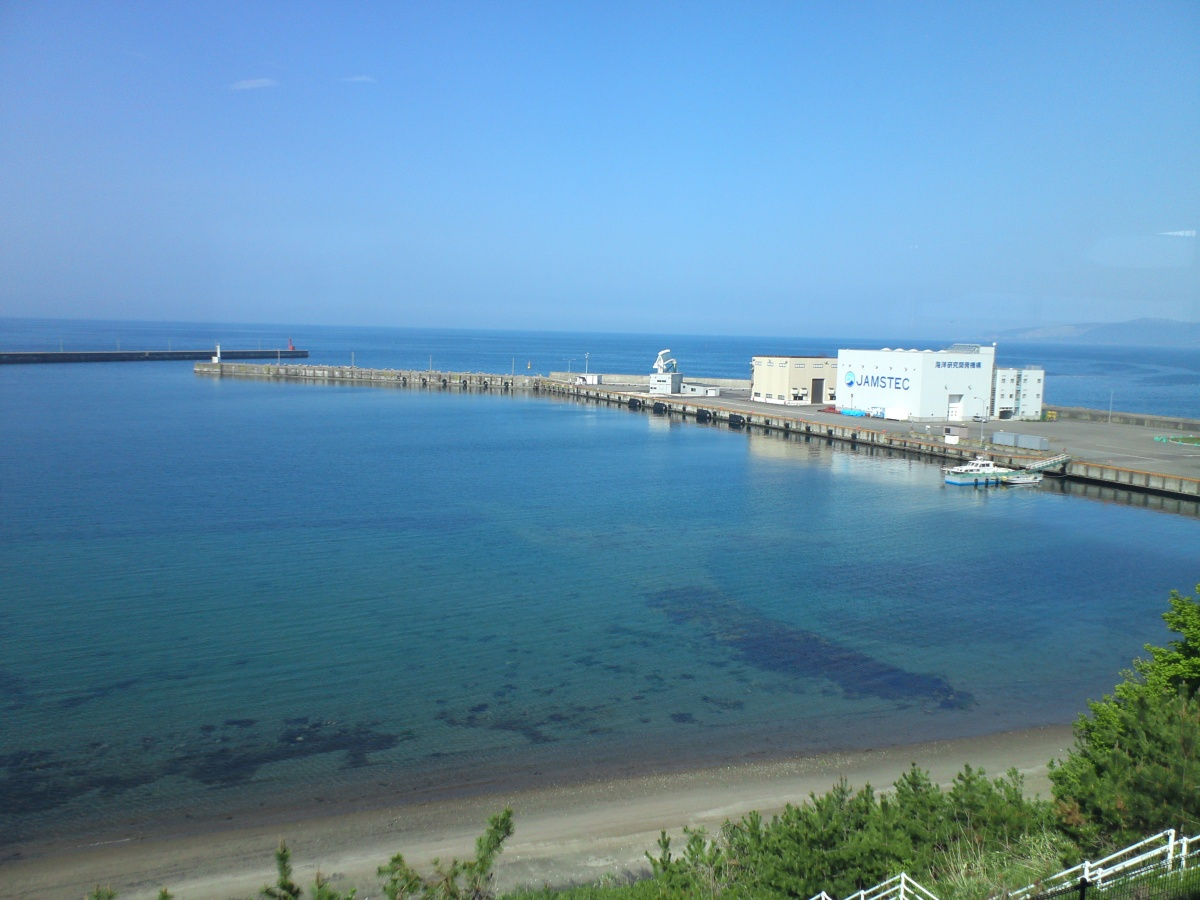 海洋地球観測船「みらい」の母港。むつ科学技術館2階から撮影。岸壁上に建っているのは海洋研究開発機構の施設。この建物前の岸壁に「みらい」が接岸する。